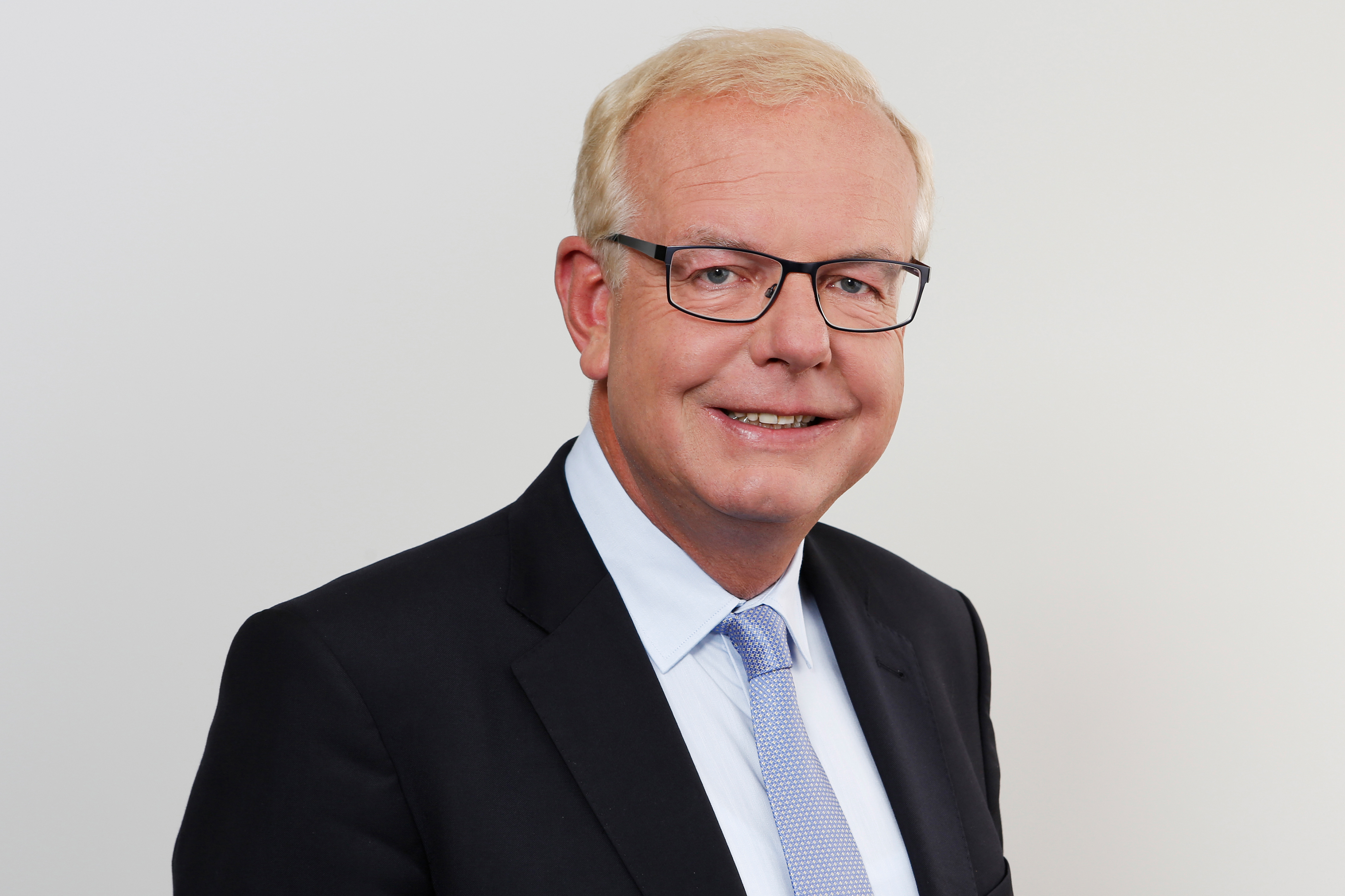 © CSU-Fraktion)